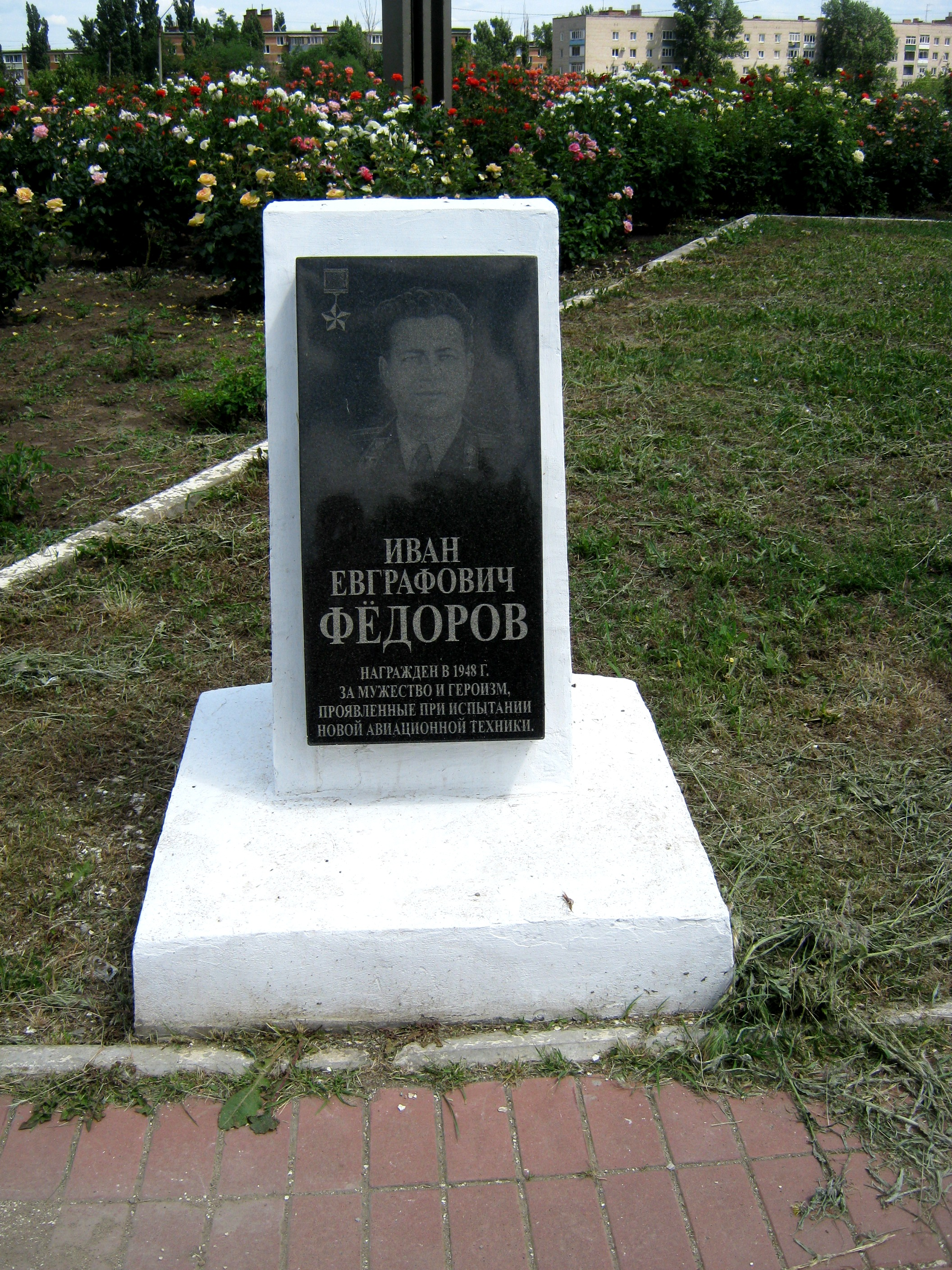 Каменск - парк Победы - Фёдоров